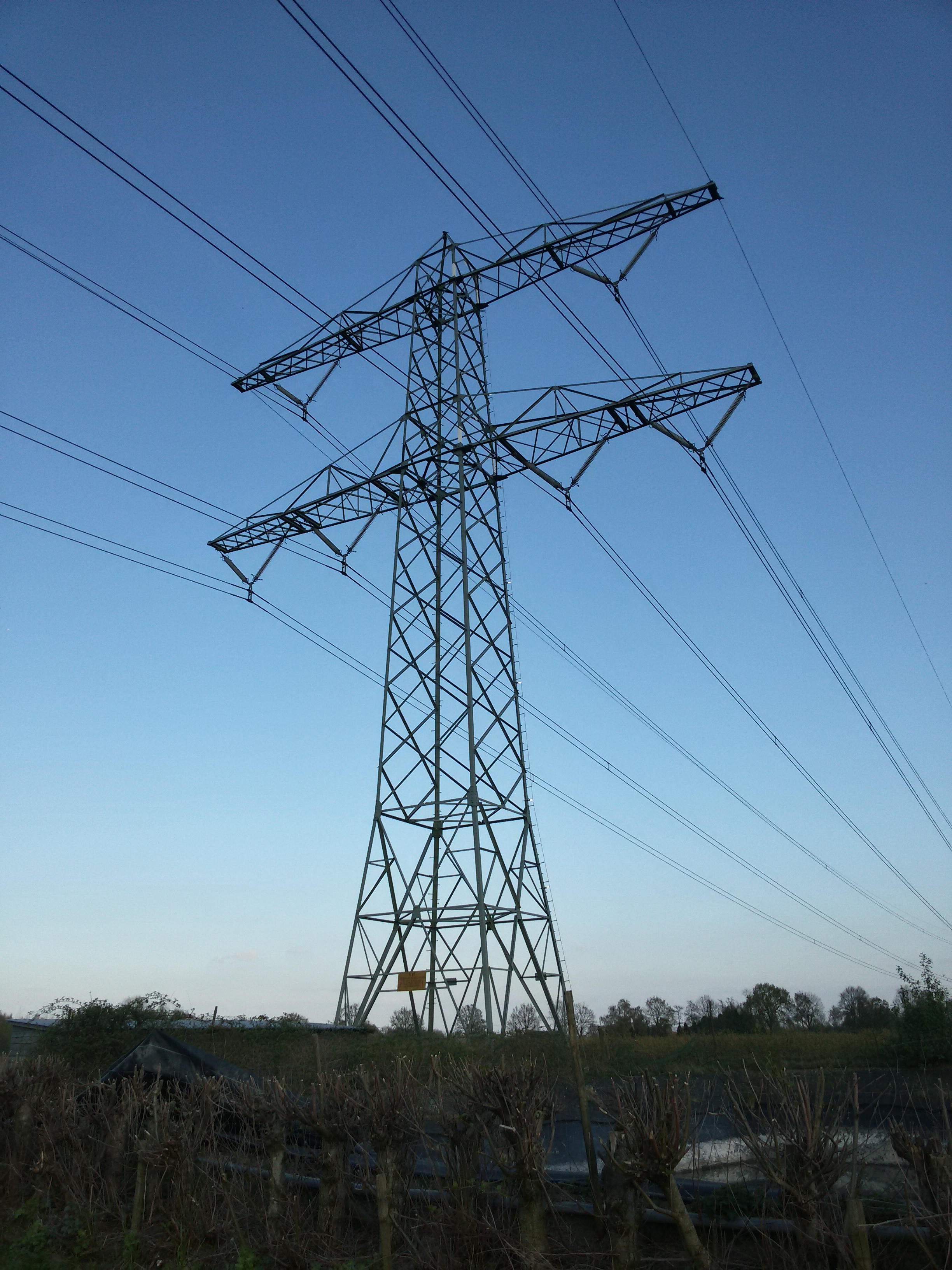 Hoogspanningsmast (Grubbenvorst)